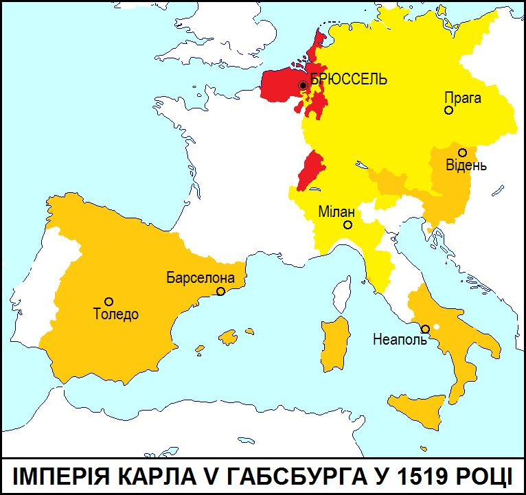 Імперія Карла V Габсбурга у 1519 році